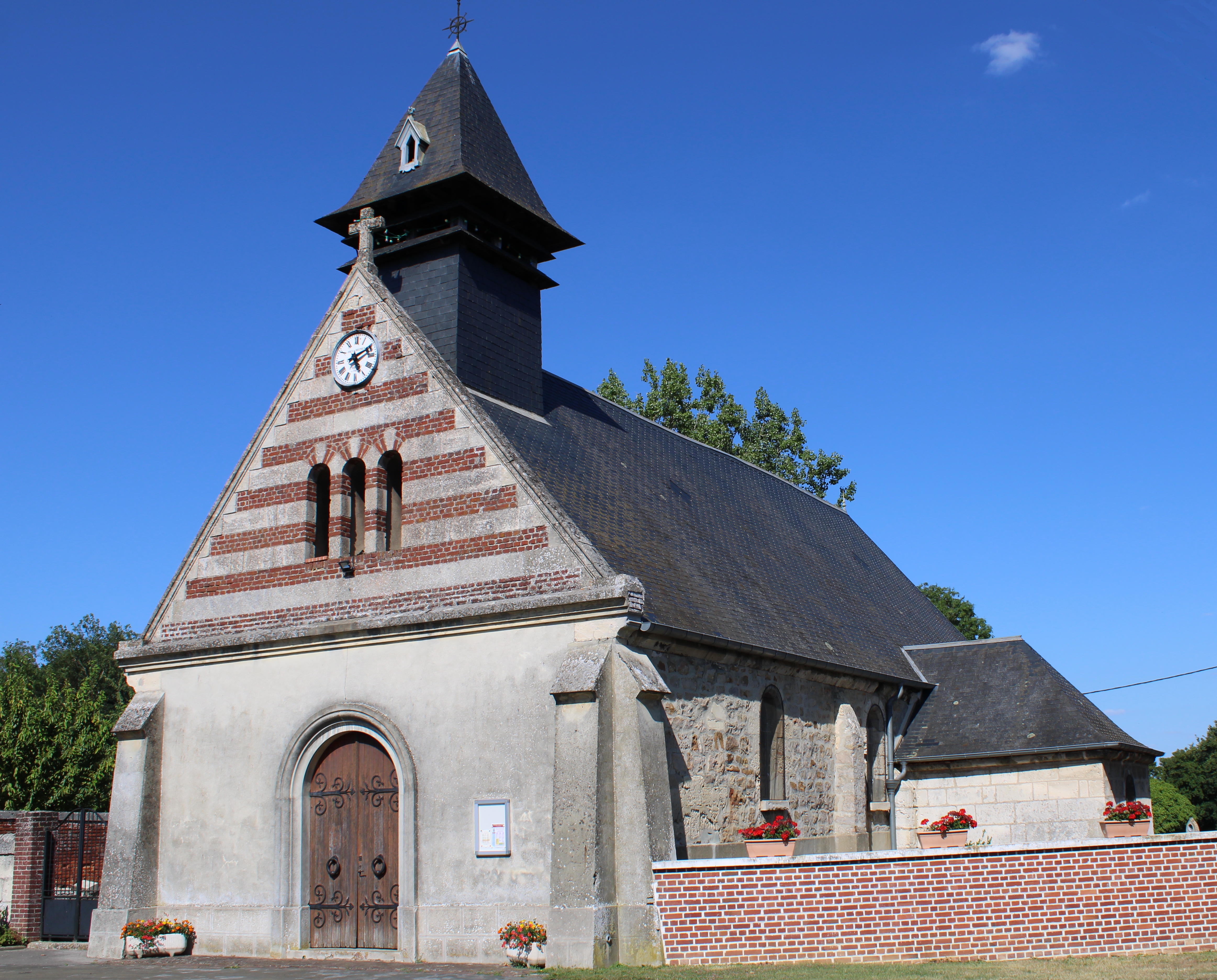 L'église.